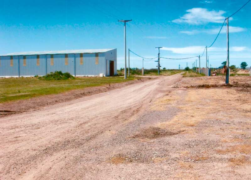 Entrada al Parque Industrial de San Martín, Buenos Aires, Argentina.